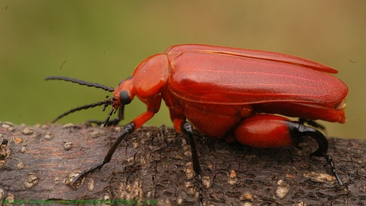 Meloidae, Horiini, Horia sp. near roepkei. From Bannerghatta, Bangalore, India.